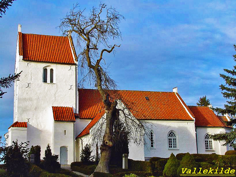 fra syd